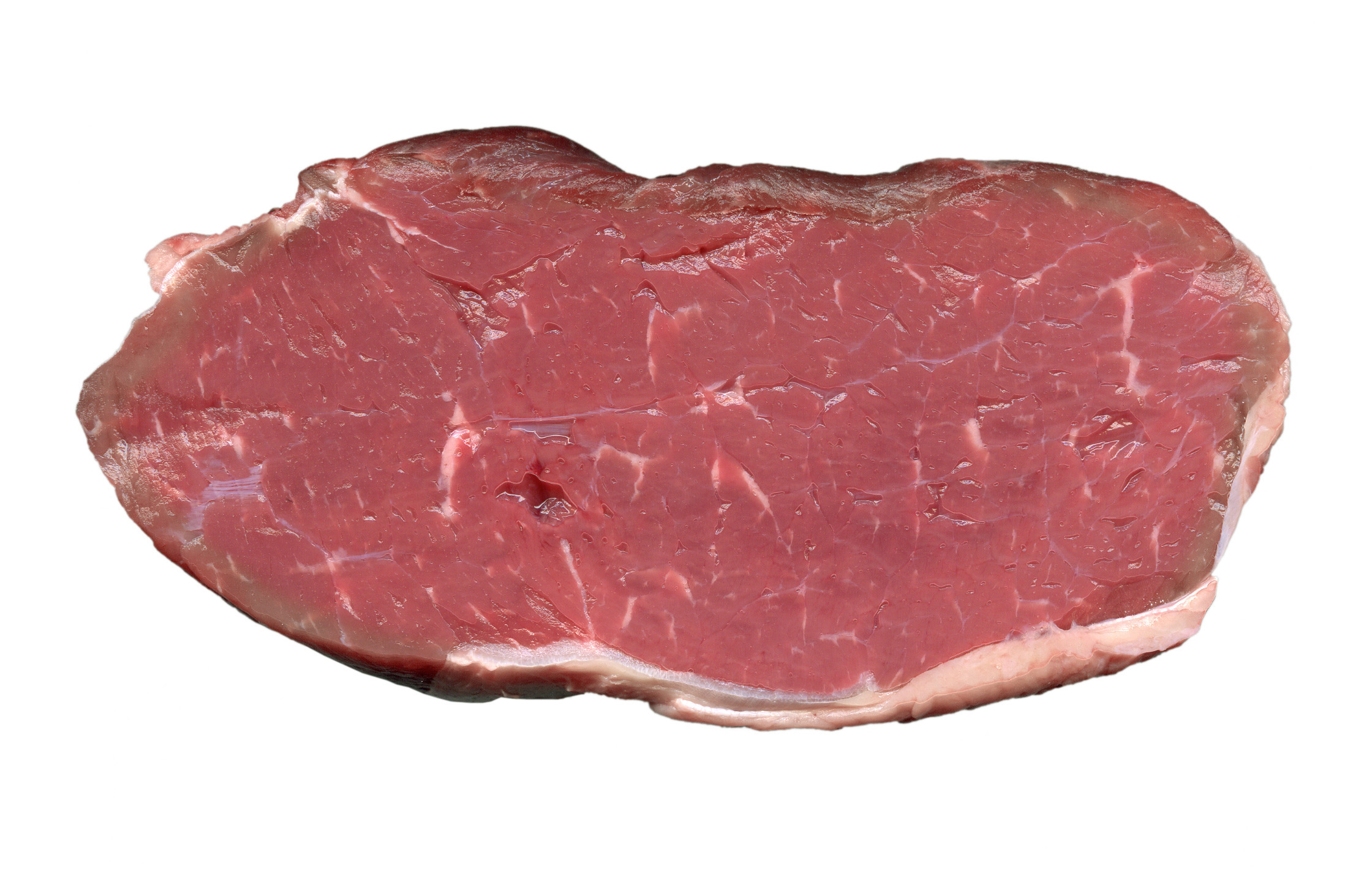 Rumpsteak